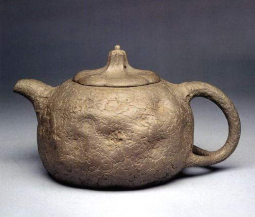 顾景舟供春壶